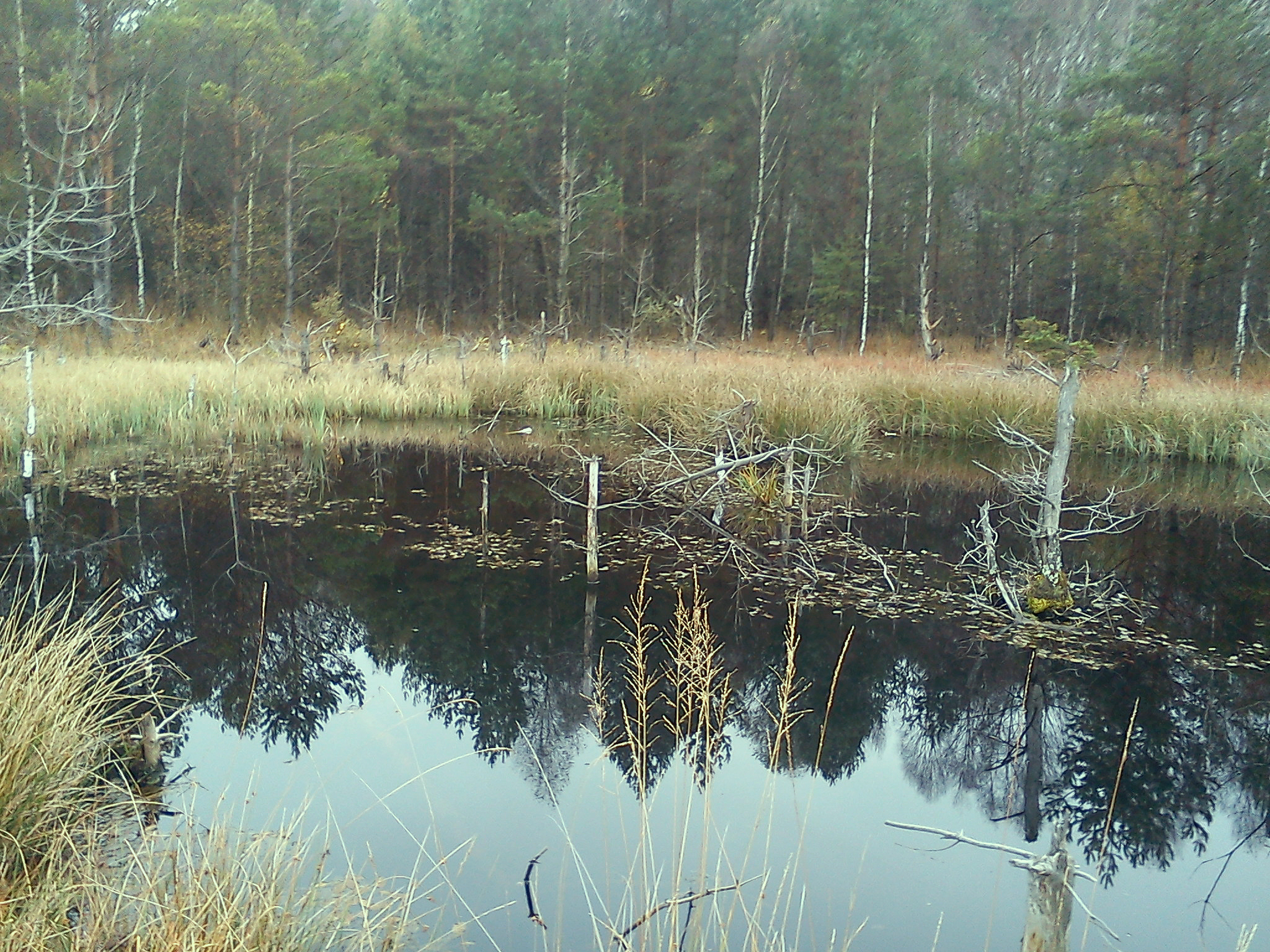 Borkovické blata - rašeliniště